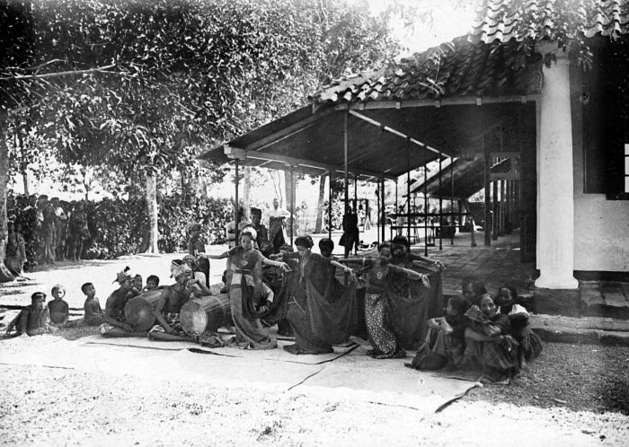 Repronegatief. Pakaréna danseressen van het eiland Salayar bij Celebes